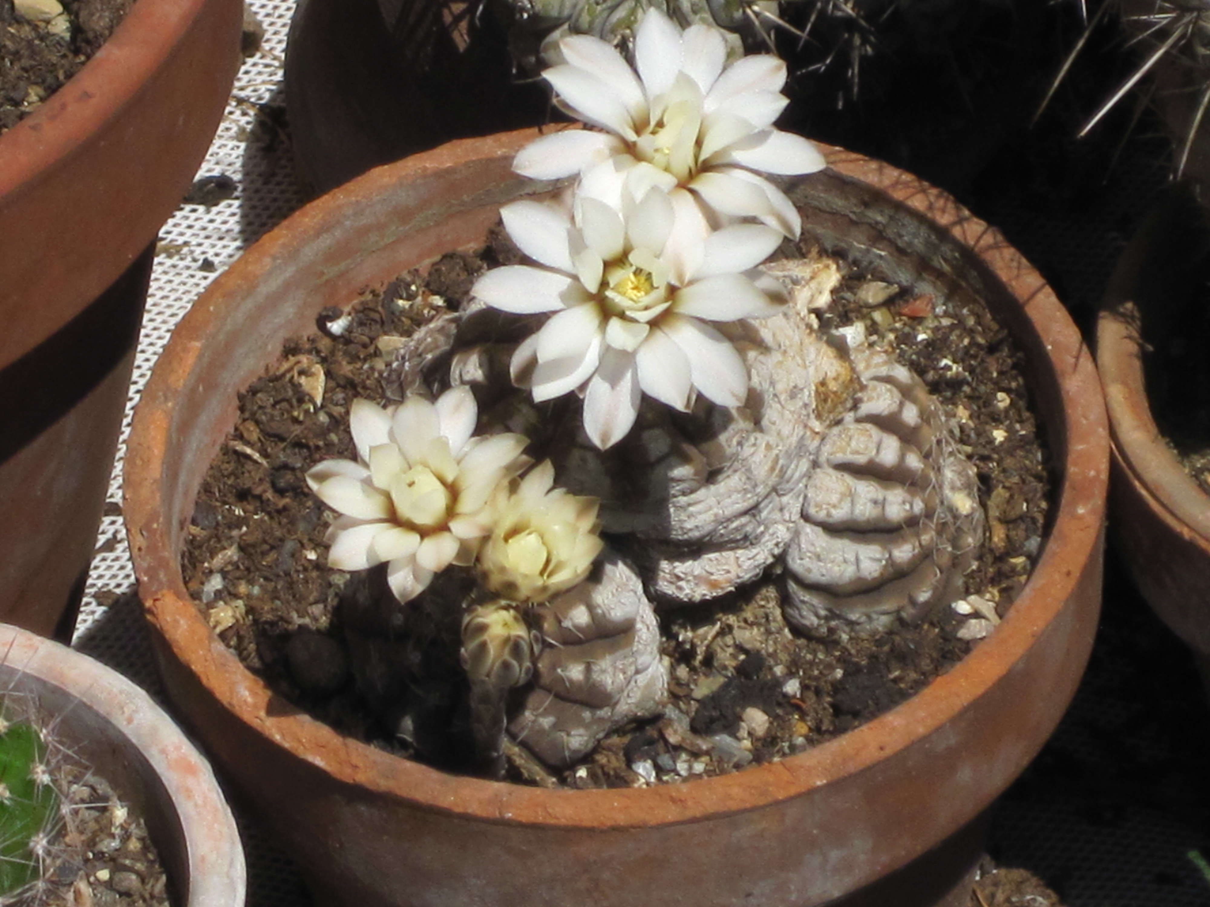 Gymnocalycium ragonesei in fioritura